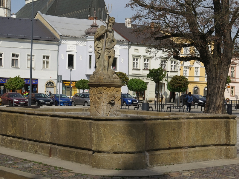 Kašna s Neptunem (Uničov), Masarykovo náměstí, Uničov, Uničov.